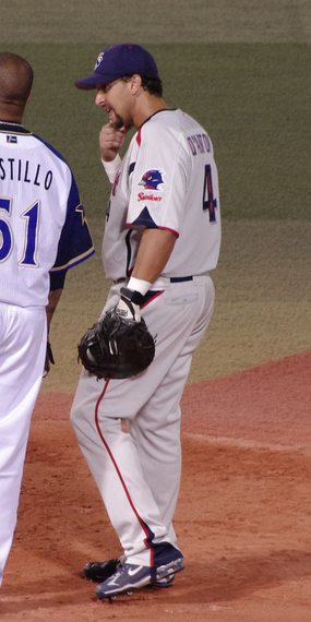 Jamie D'Antona